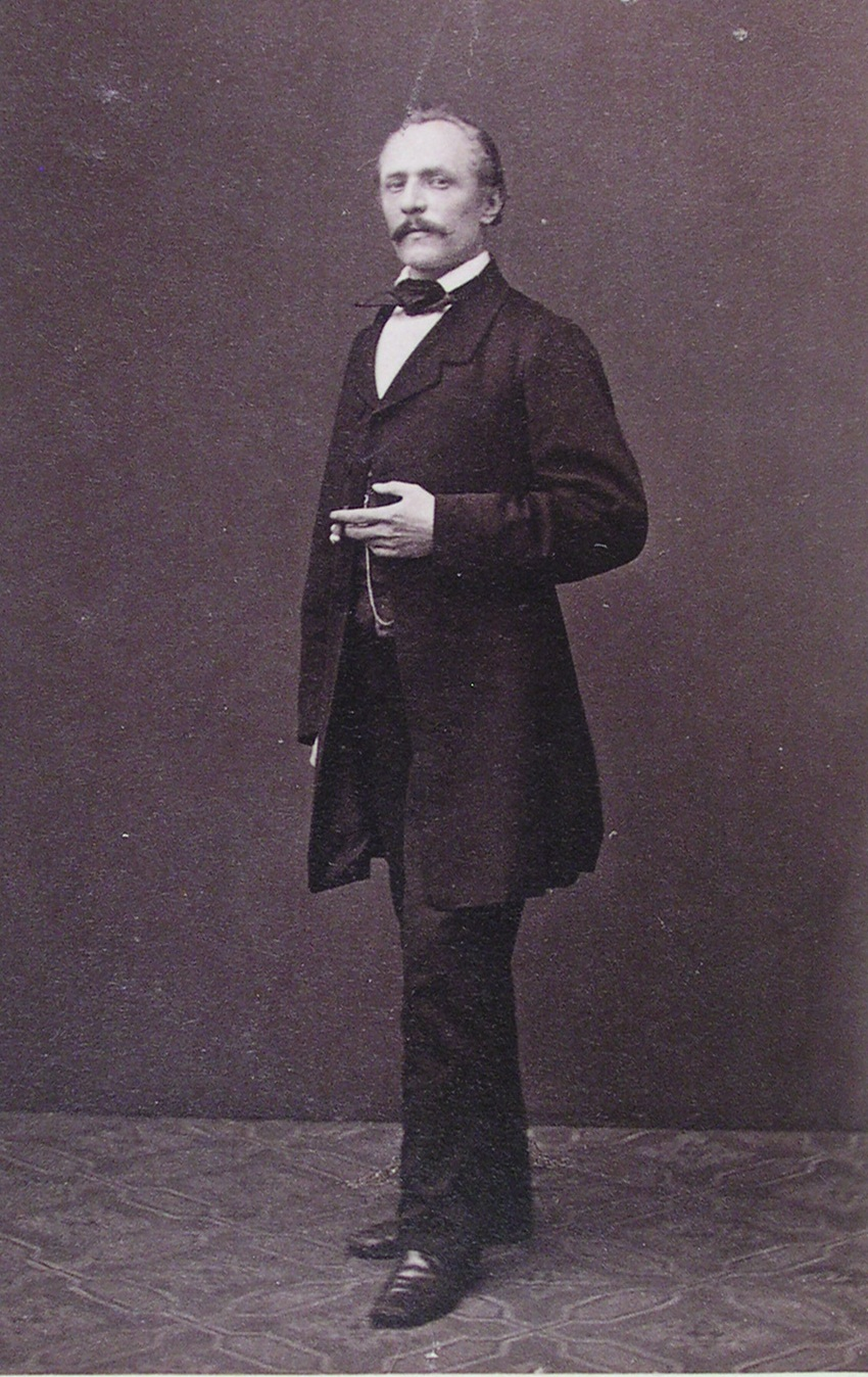 Porträtfoto Hubert Salentin